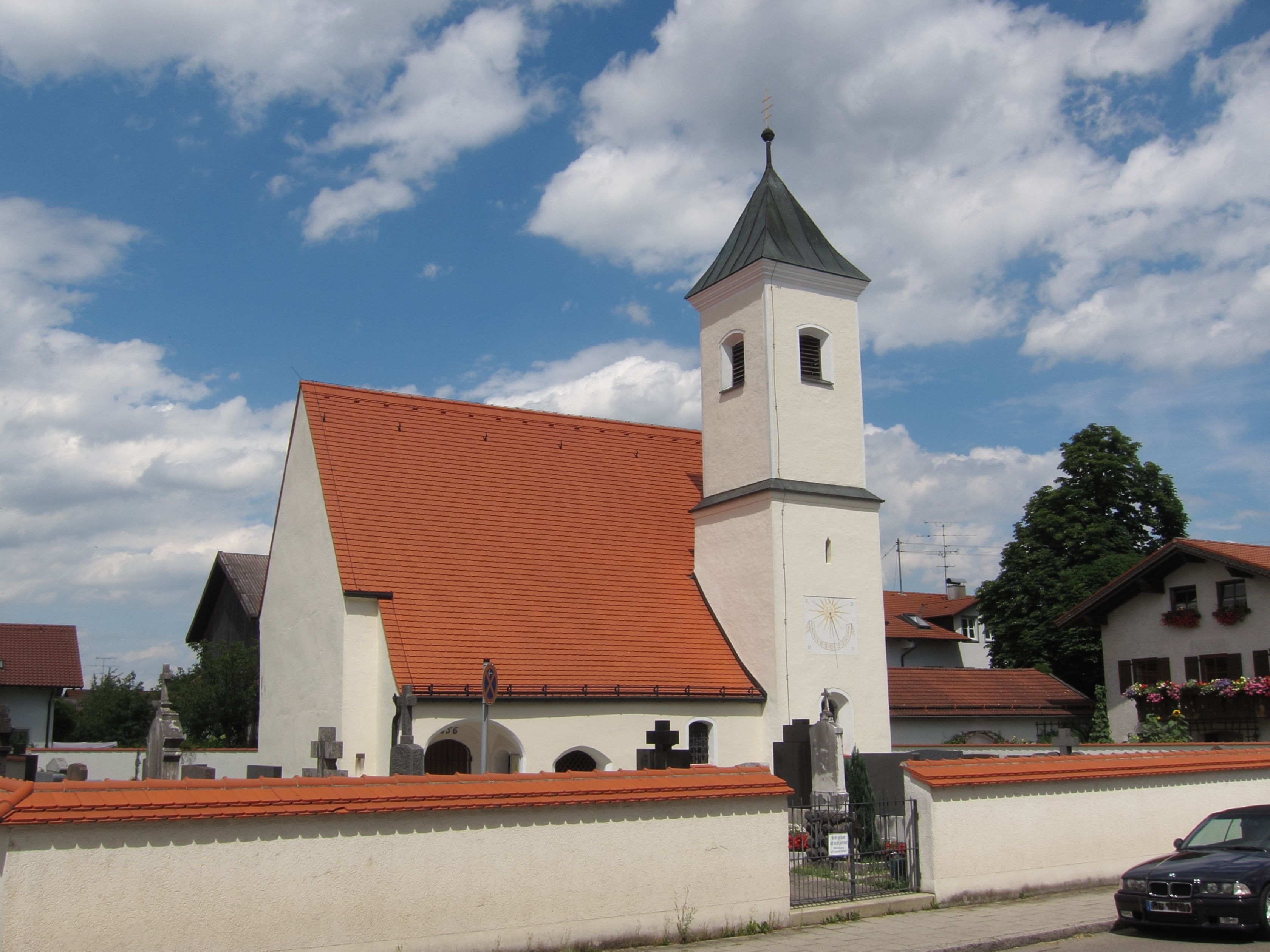 Baldham-Dorf, Vaterstettener Straße 14; katholische Filialkirche St. Corbinian, Langhaus im Kern romanisch, barocker Ausbau 1656/61; mit Ausstattung.